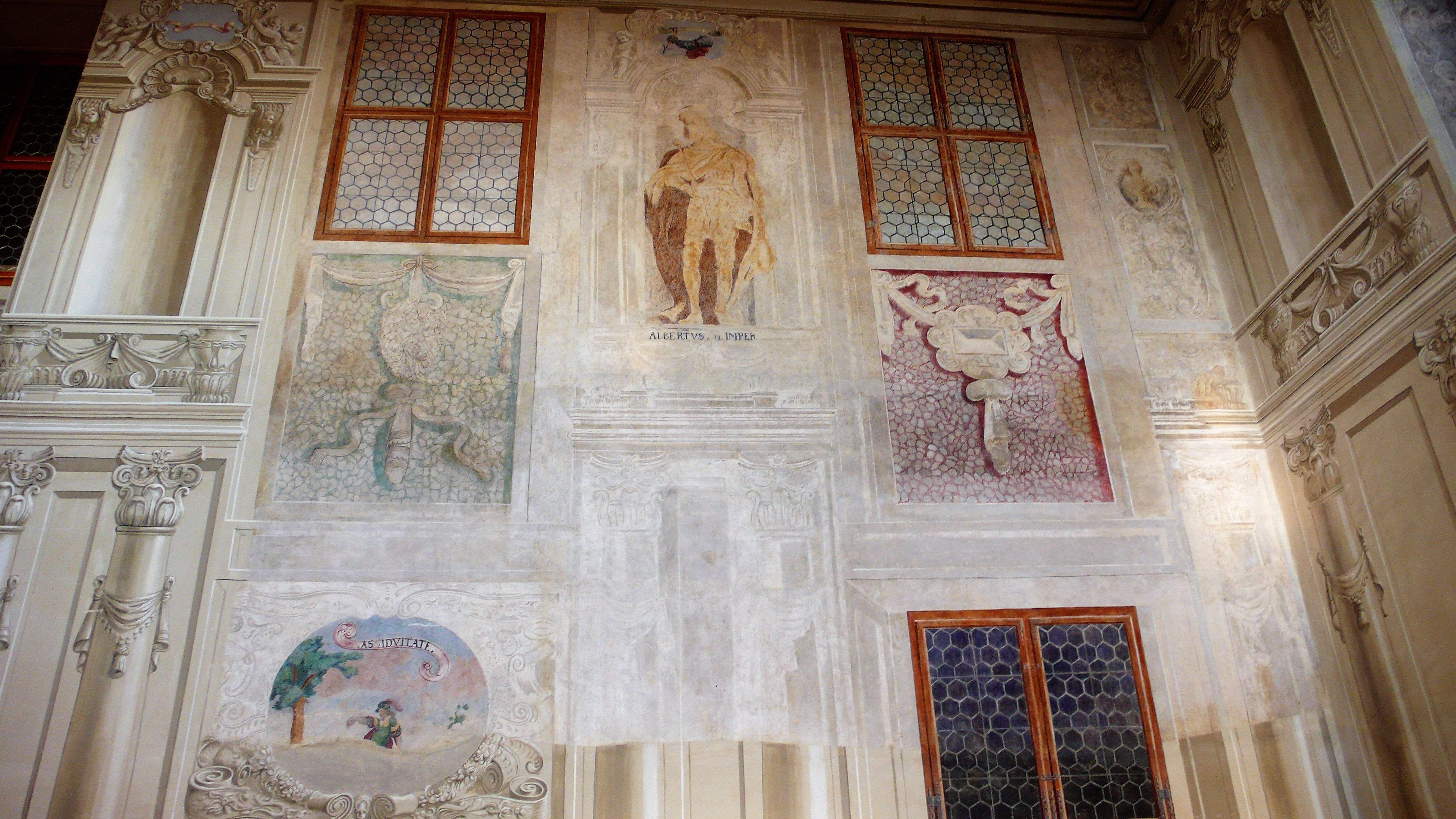 Císařský sál Lobkowiczského paláce (Pražský hrad), zbytky freskové výzdoby s postavou císaře, Fabián Harovník (1665–1669)